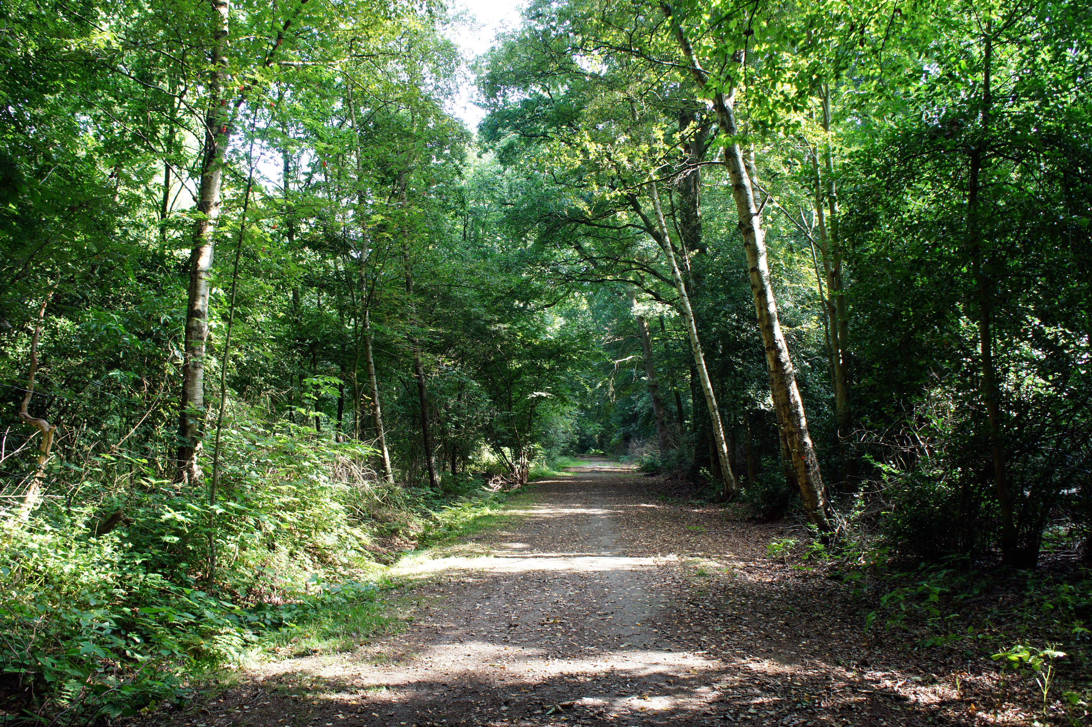 LSG WST00093 Elmendorfer Holz, Landkreis Ammerland